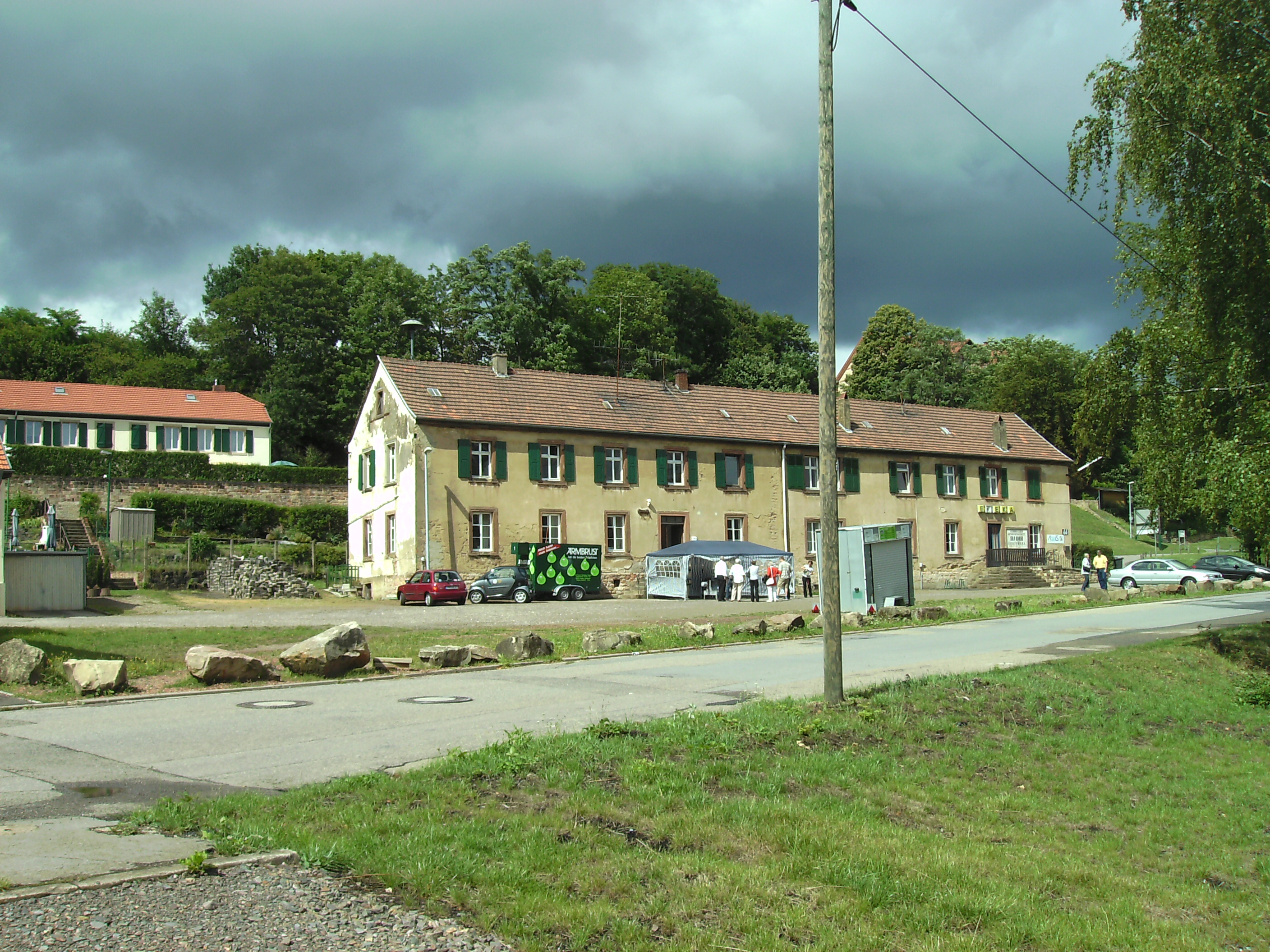 Alte Schmelz St. Ingbert: rennoviertes Arbeiterhaus und Gebäude des "Konsums"